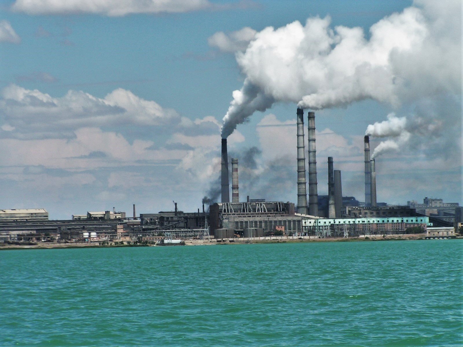 БГМК. На переднем плане Балхашская ТЭЦ